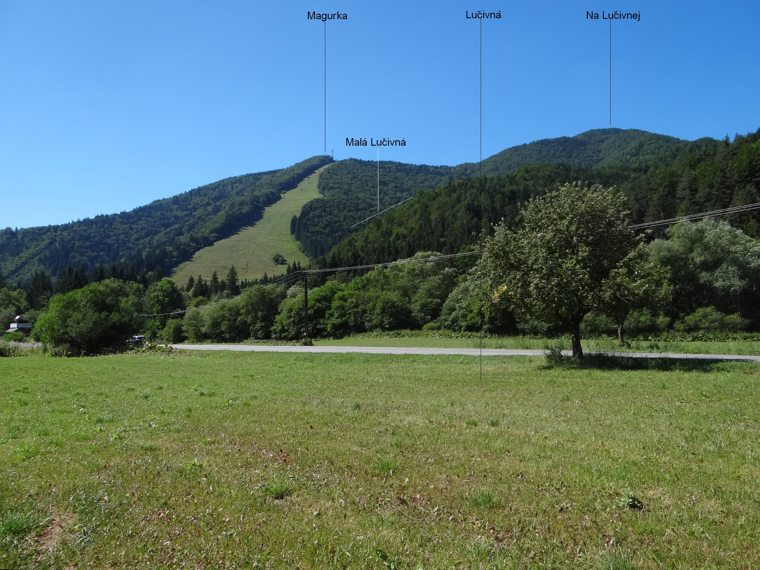 Lučivná